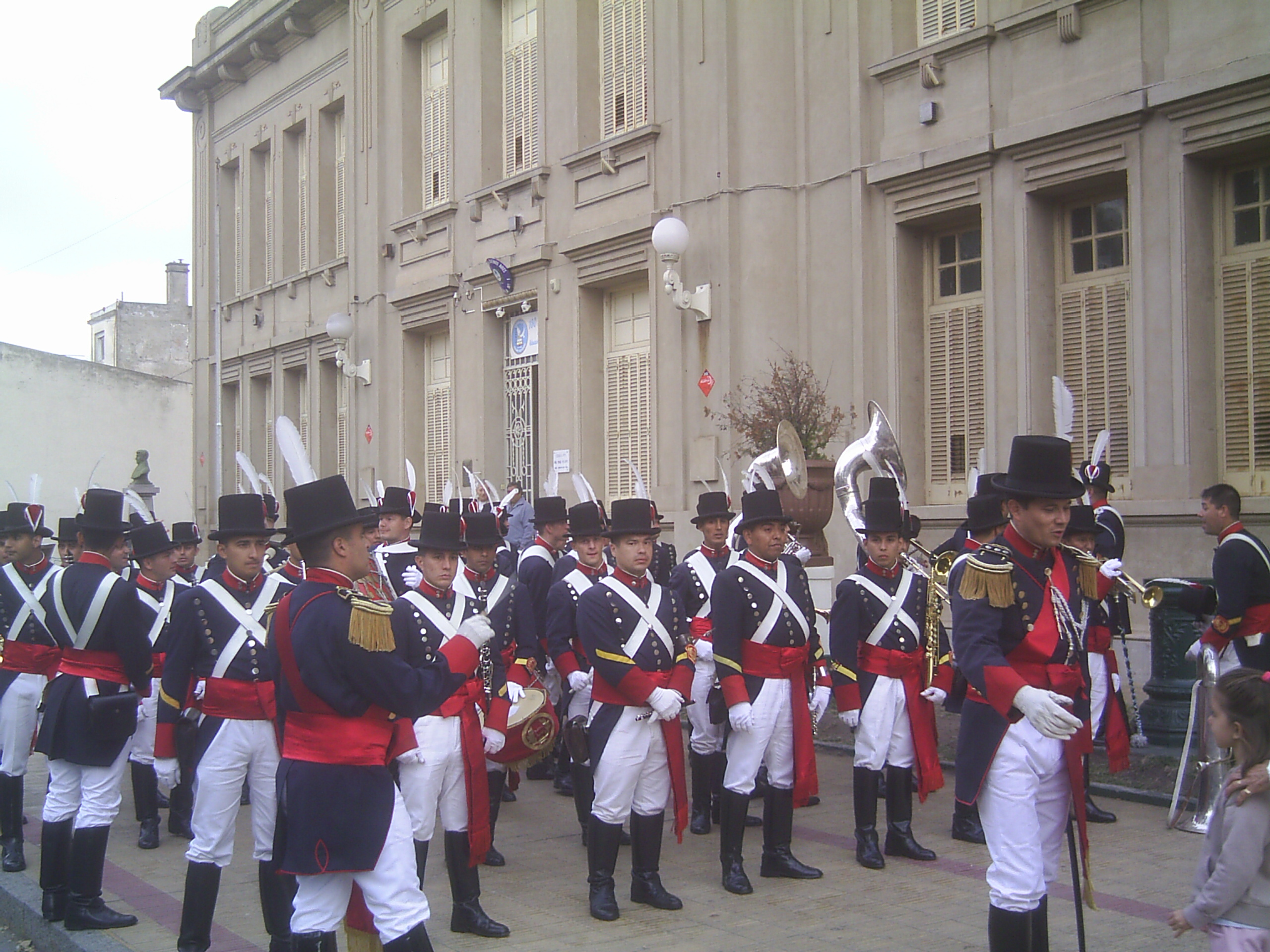 Regimiento de Patricios. Banda de música